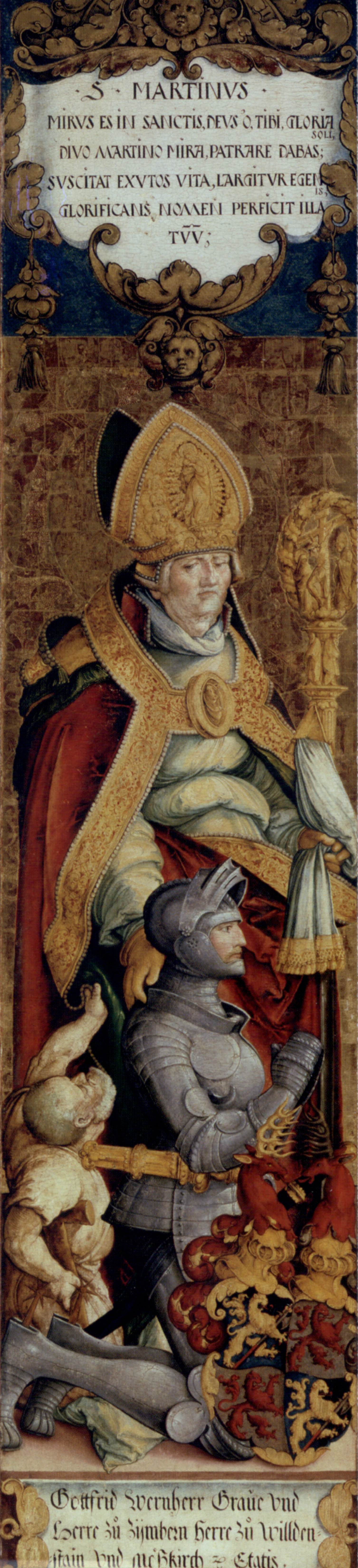 linke Flügelinnenseite des ehemaligen Hochaltars der St. Martinskirche, Hl. Martin mit Bettler und dem Stifter Gottfried Werner von Zimmern; Staatsgalerie Stuttgart, früher Donaueschingen, Fürstenbergsammlungen Inv.Nrn. 73-75